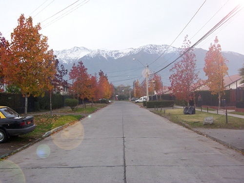 Autor: Antonio Araya Imagen: Barrio de La Florida, Santiago de Chile